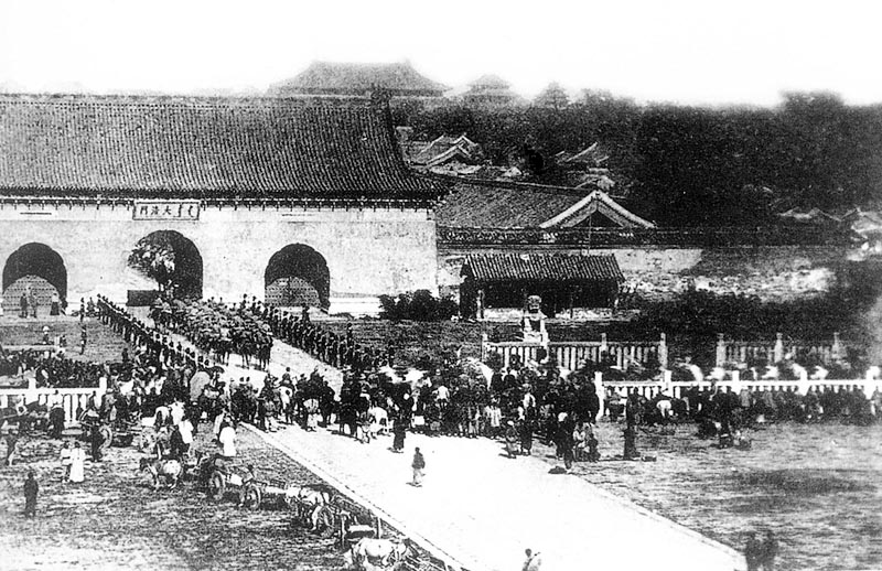 1902年的大清门